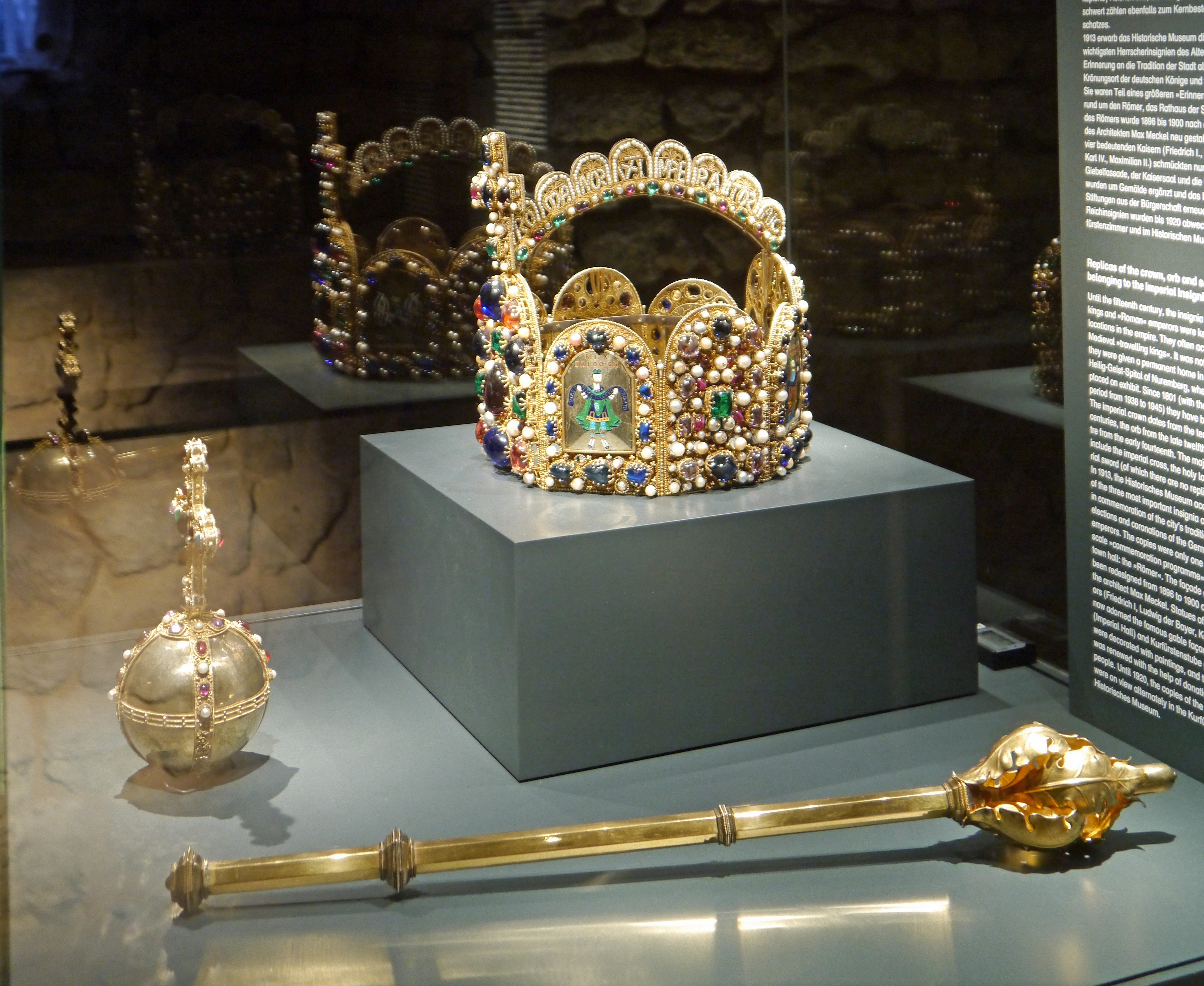 Historisches Museum Frankfurt (2013). Kopien der Reichsinsignien.